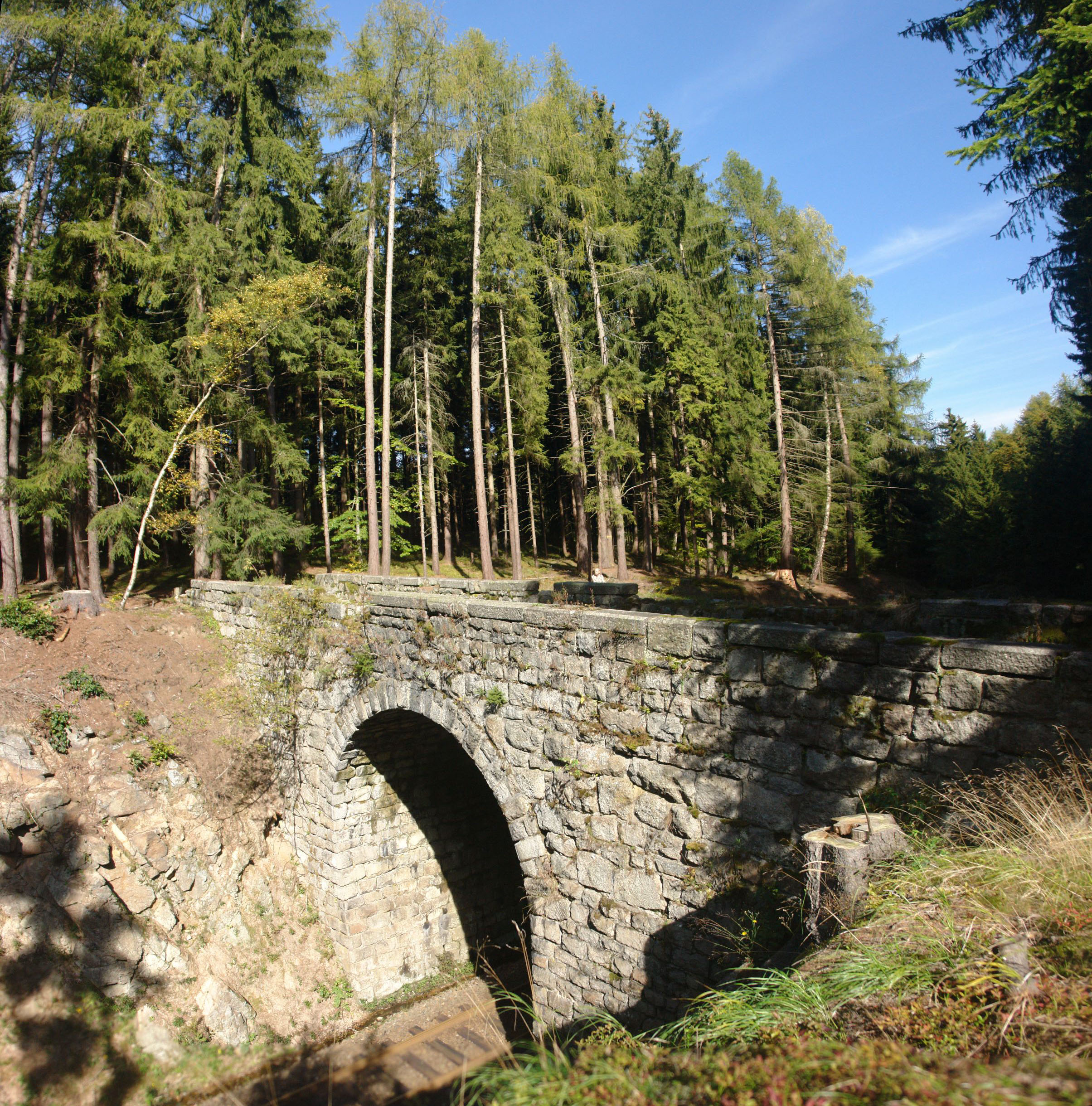 Most nad tratí na lesní cestě v lese za obcí Tisová.